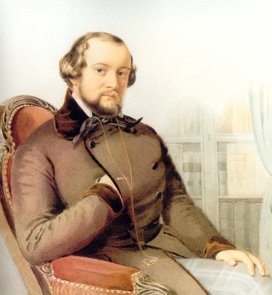 Portrait von Alfred Escher (1819–1882)